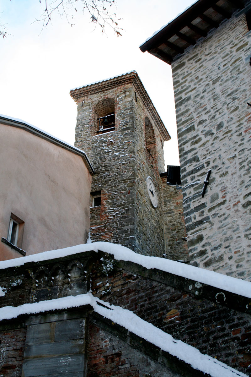 Apecchio - Torre campanaria